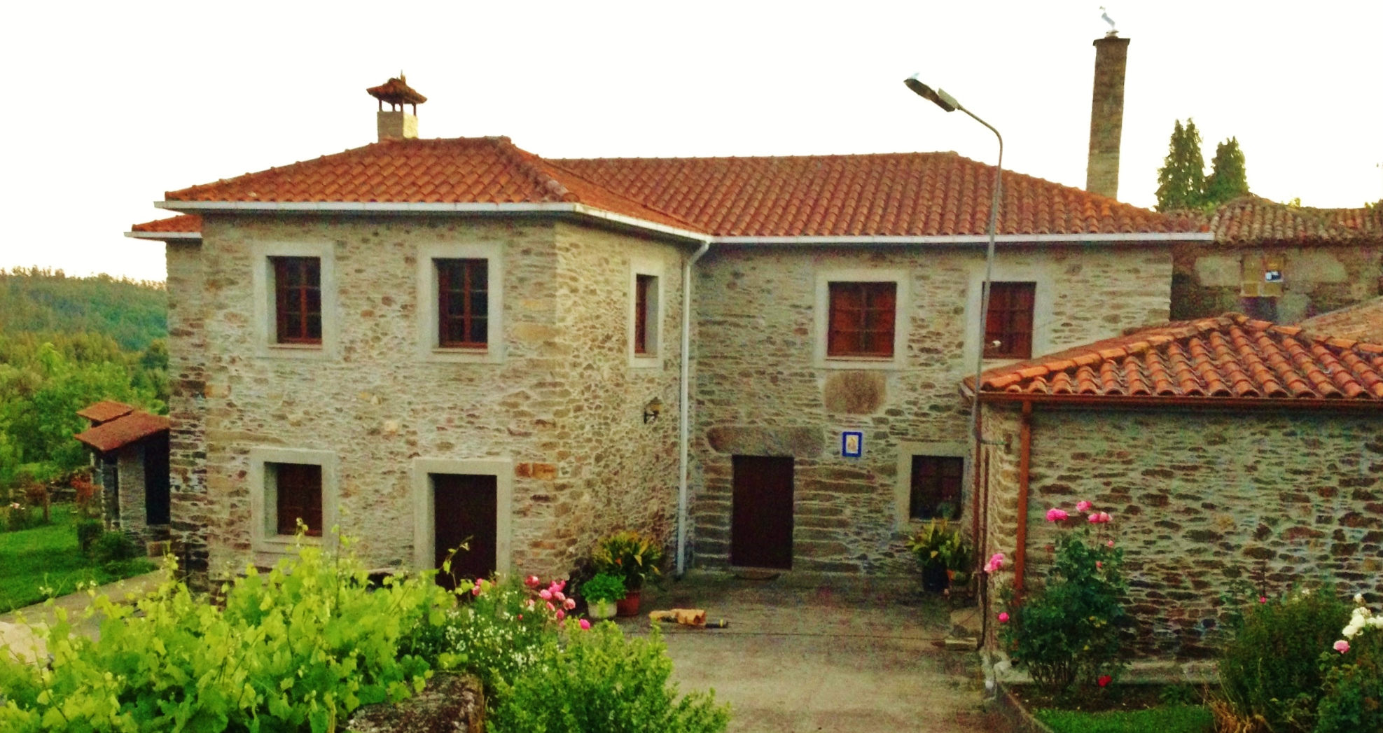 Fachada leste do Pazo Mariñas (Aiazo)